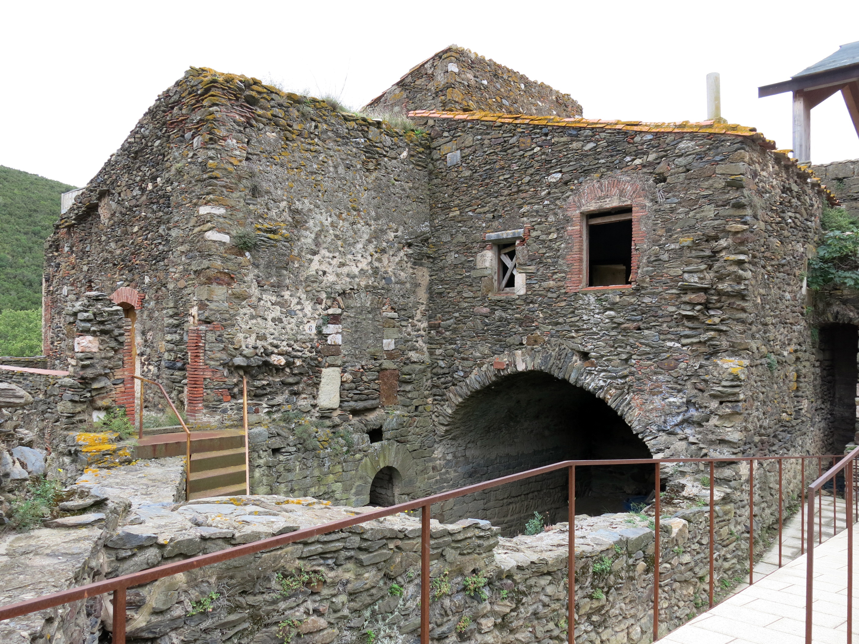 Conjunt monàstic de Sant Quirze de Colera (Rabós)